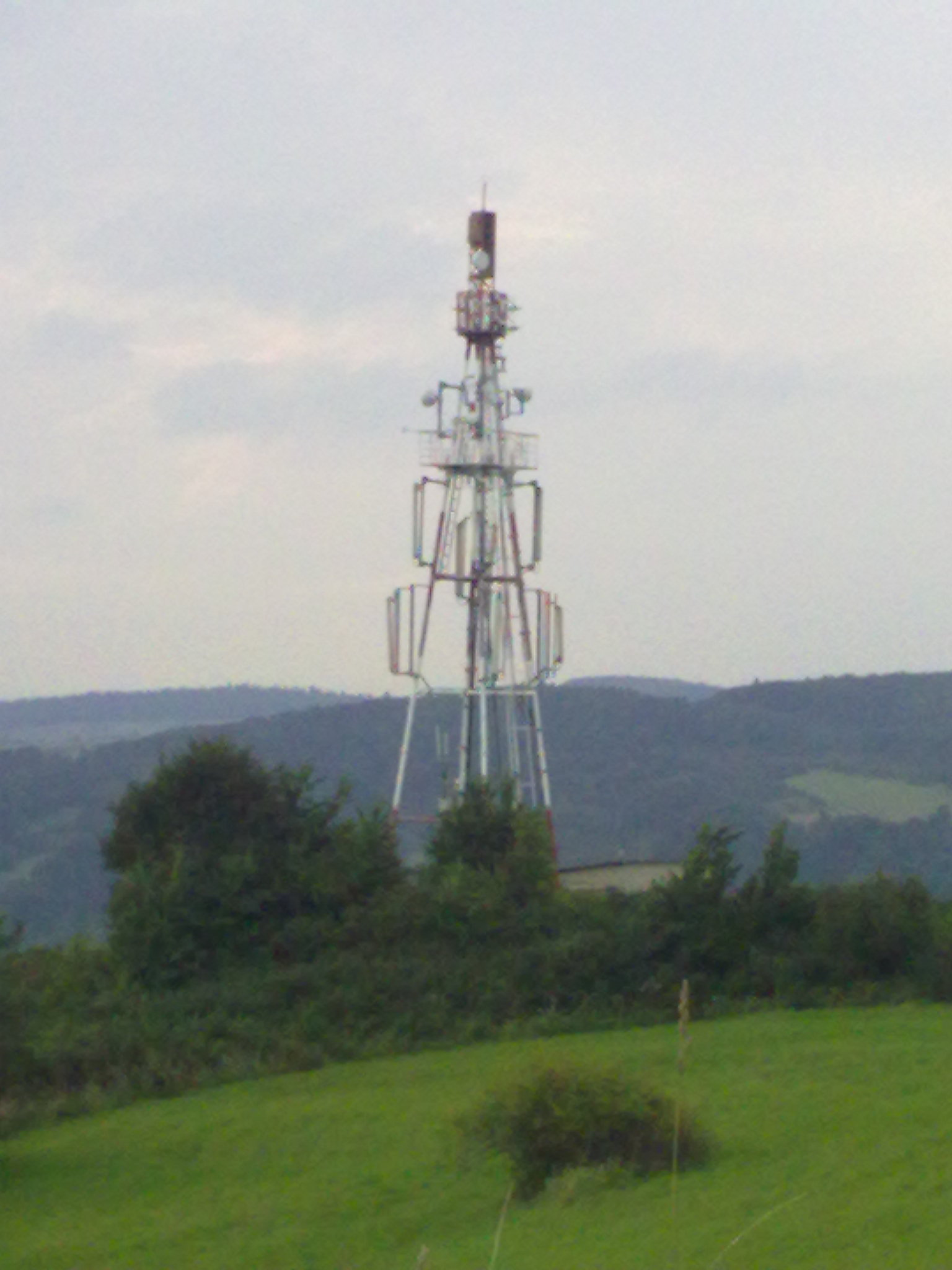 Wieża przekaźnikowa na górze "Makówka" w miejscowości Tarnawa Górna (podkarpackie). Na maszcie przekaźniki TVP1, TVP2, Orange, Plus, Play, T-Mobile, ZUT Zagórz (internet Wi-Fi).